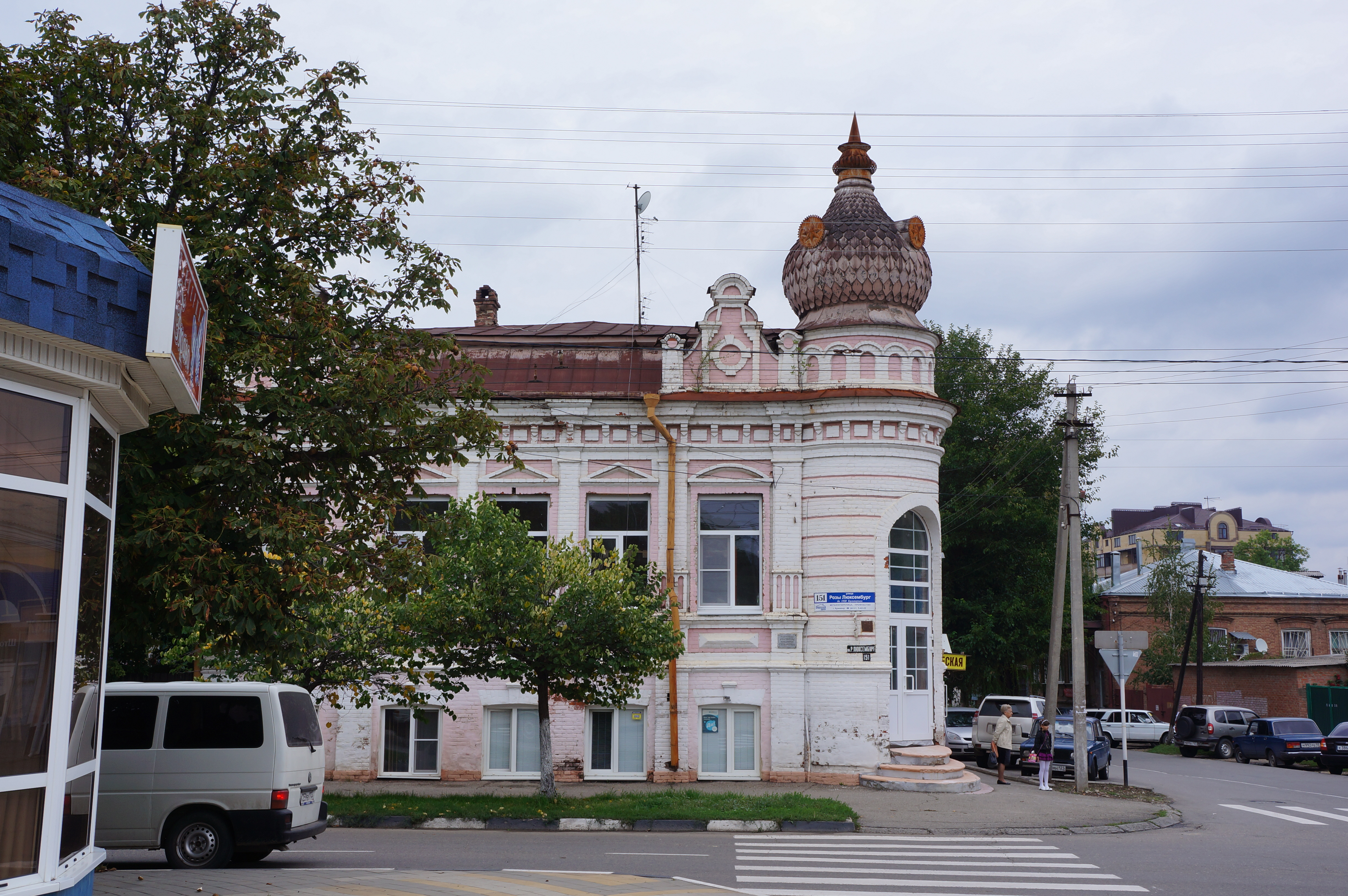 Жилой дом (Краснодарский край, Армавир, либкнехта улица, 46 (угол улицы Р. Люксембург, 151))